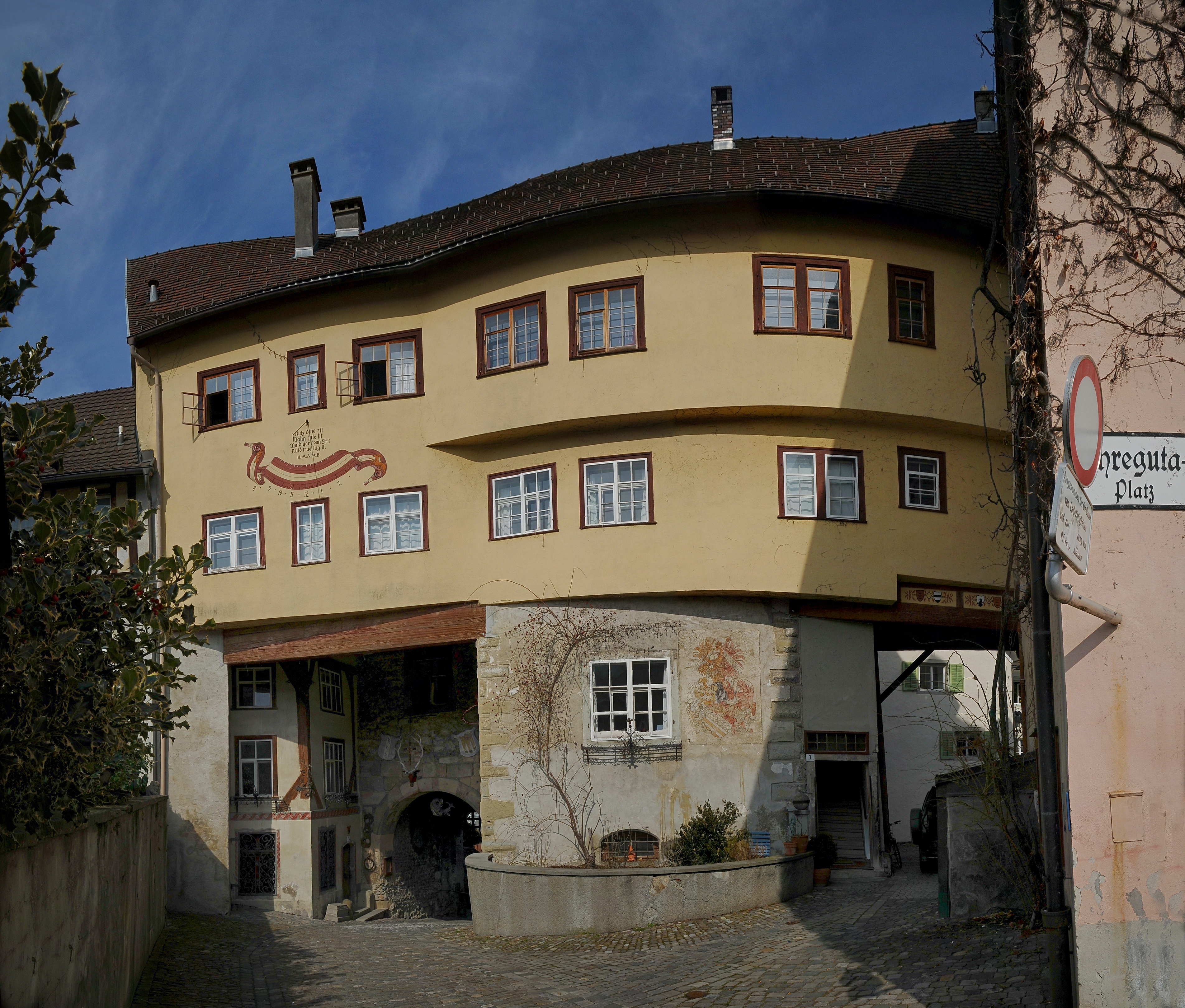 Ehregutaplatz Nr.1 in der Oberstadt von Bregenz, Vorarlberg